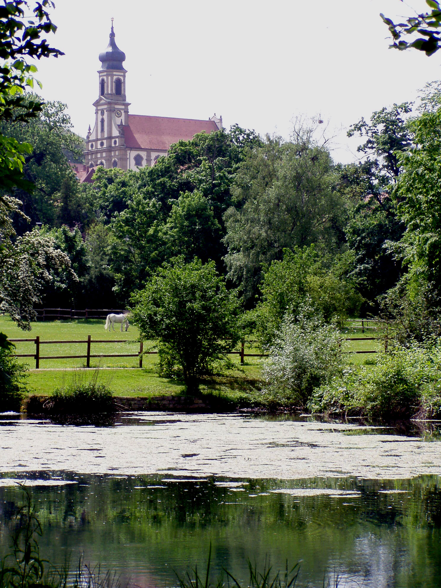 Grafschaftskirche Castell mit Schlossparksee